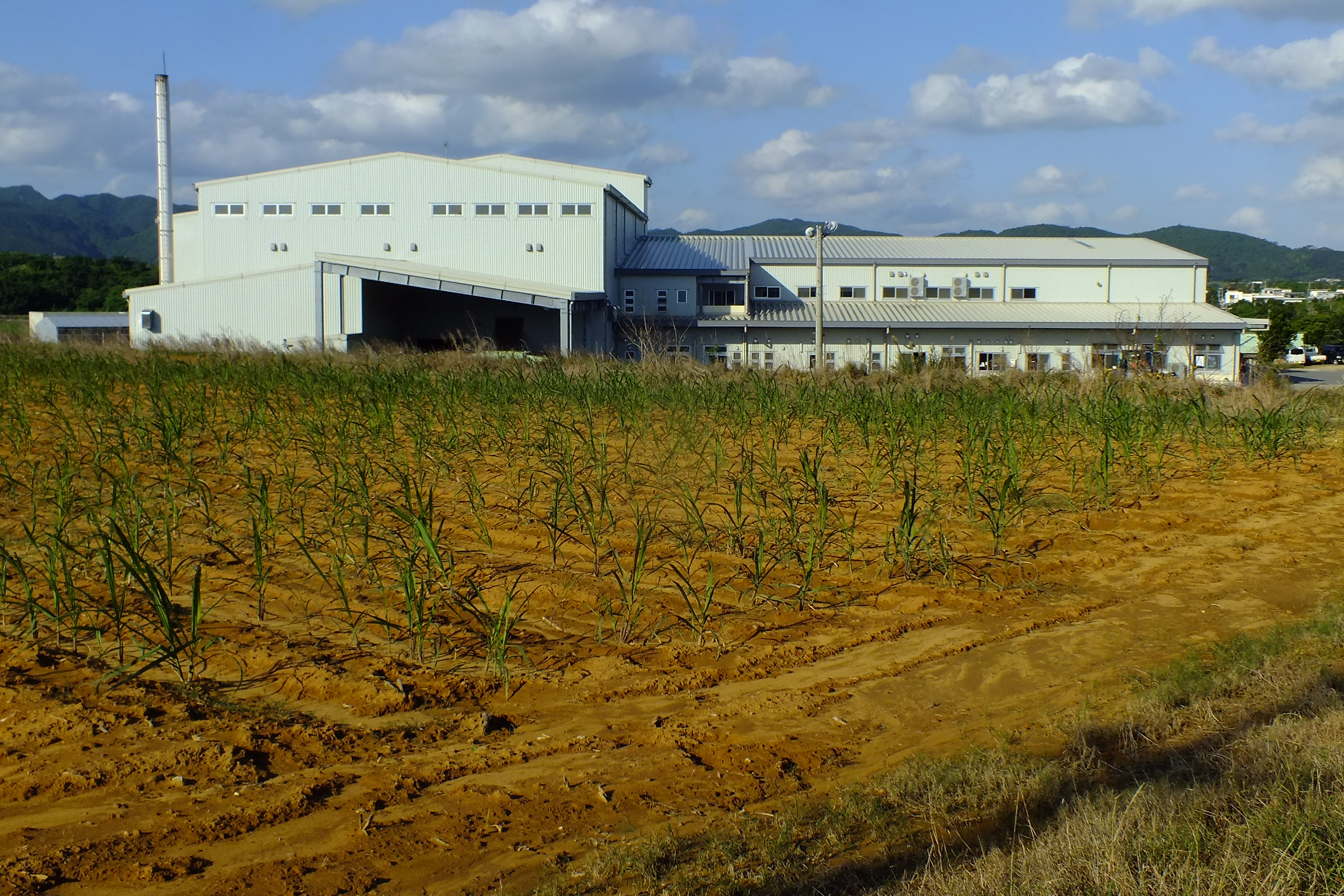 ■ 企業名： 西表糖業（株） ■ 代表者名： 金城 一夫 ■ 住所： 〒907-1434 沖縄県八重山郡竹富町字南風見３３３－４１ ■ TEL： 0980-85-5150 ■FAX： 0980-85-5478